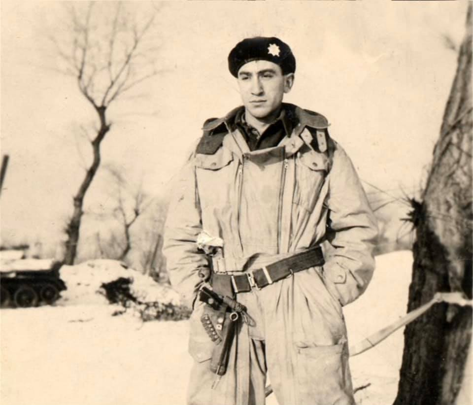 Jan Horal